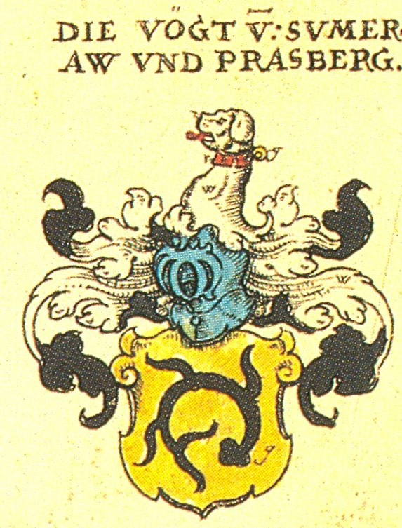 Ritterschaft und Adel in Schwaben Die Vogt von Sumerau und Prasberg